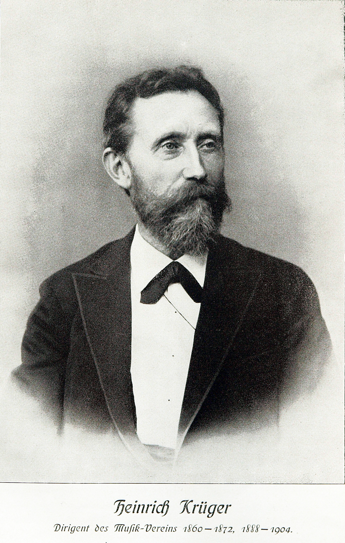 Heinrich Krüger, Klavier- und Gesanglehrer, Gründer des Musikverein Bochum im Jahr 1860, Chorleiter und Dirigent des Musikverein Bochum von 1860-1872 und von 1888-1904